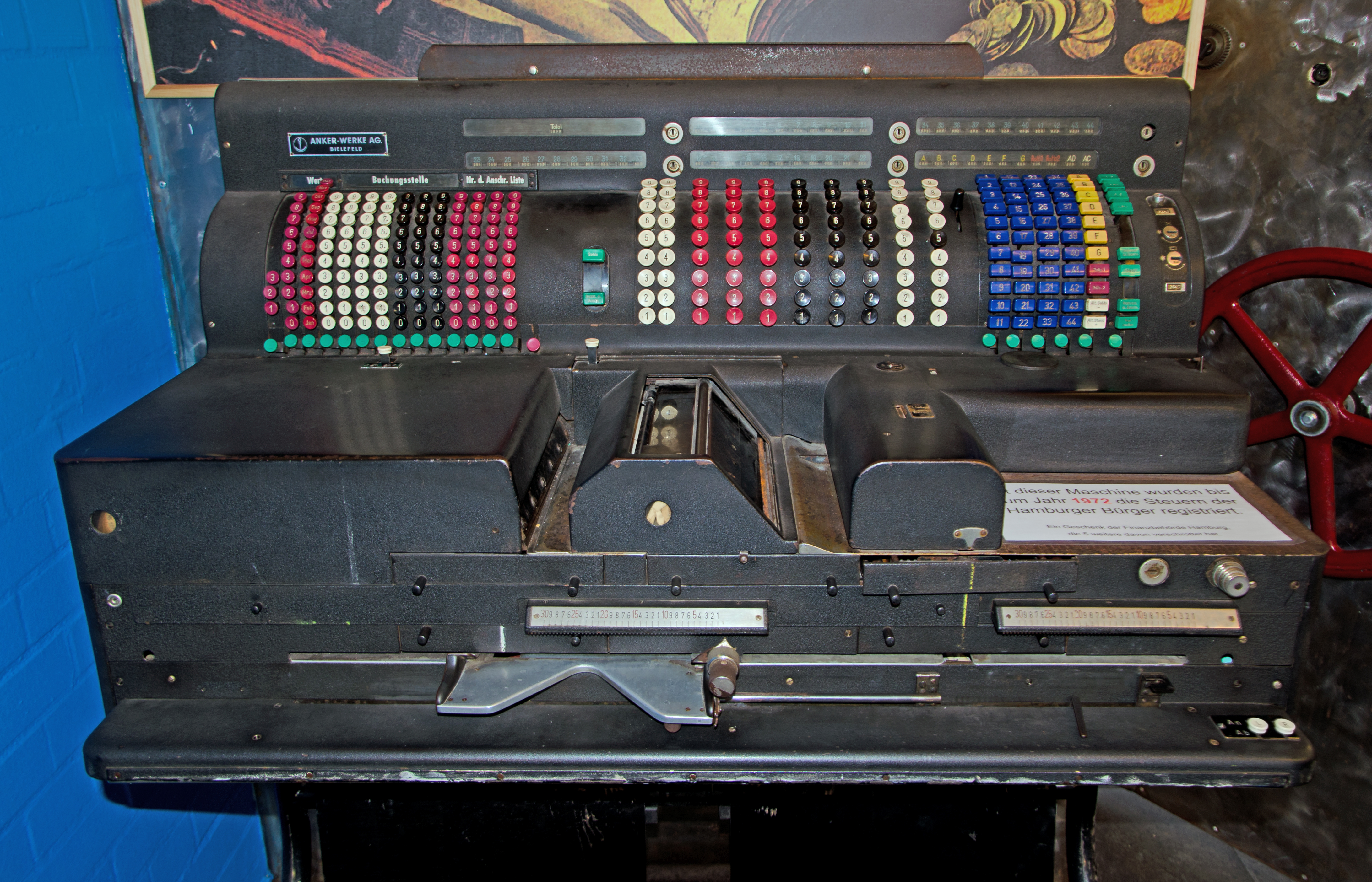 Mit dieser Maschine wurden bis zum Jahr 1972 die Steuern der Hamburger Bürger registriert. Dieses Exemplar steht im Hamburger Klickmuseum. Fünf weitere wurden von der Finanzbehörde verschrottet.